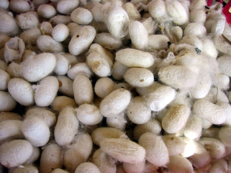 Kokony bource morusoveho